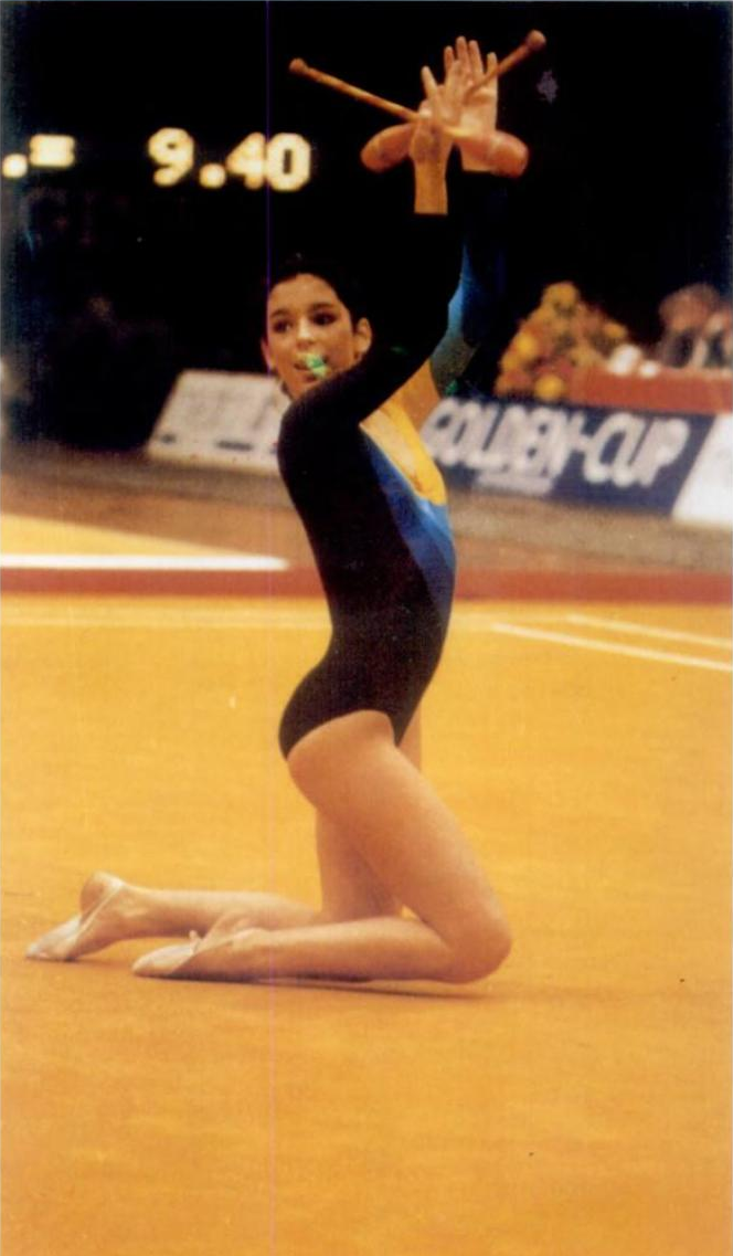 Lourdes Osuna en el Campeonato Europeo de Gimnasia Rítmica de Viena en 1984.